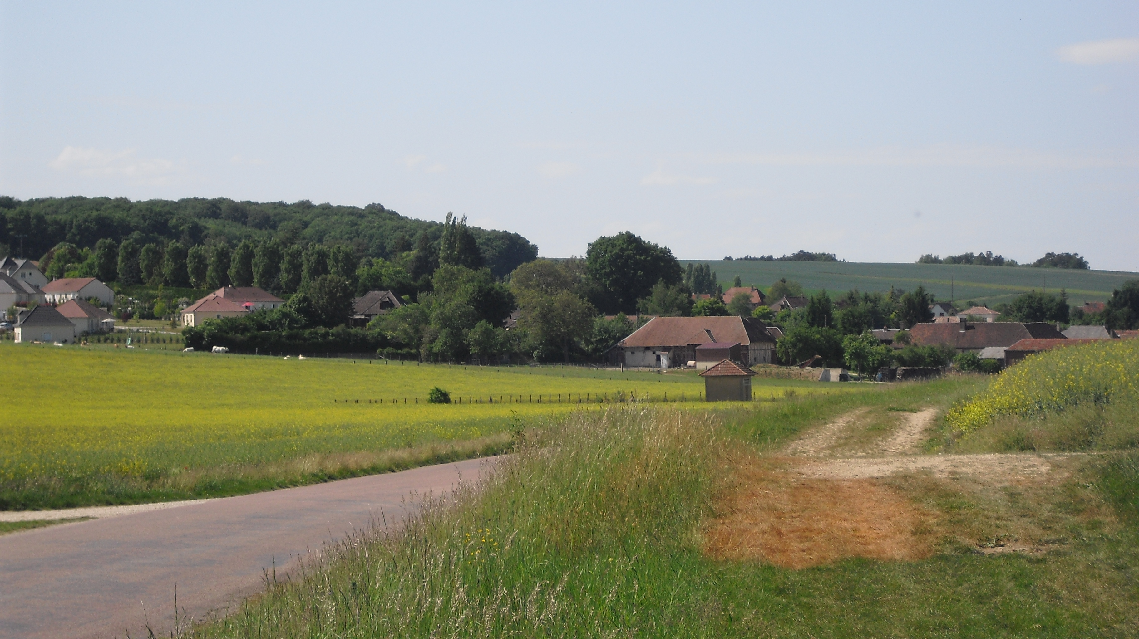 Entrée du village de Prugny depuis la D83